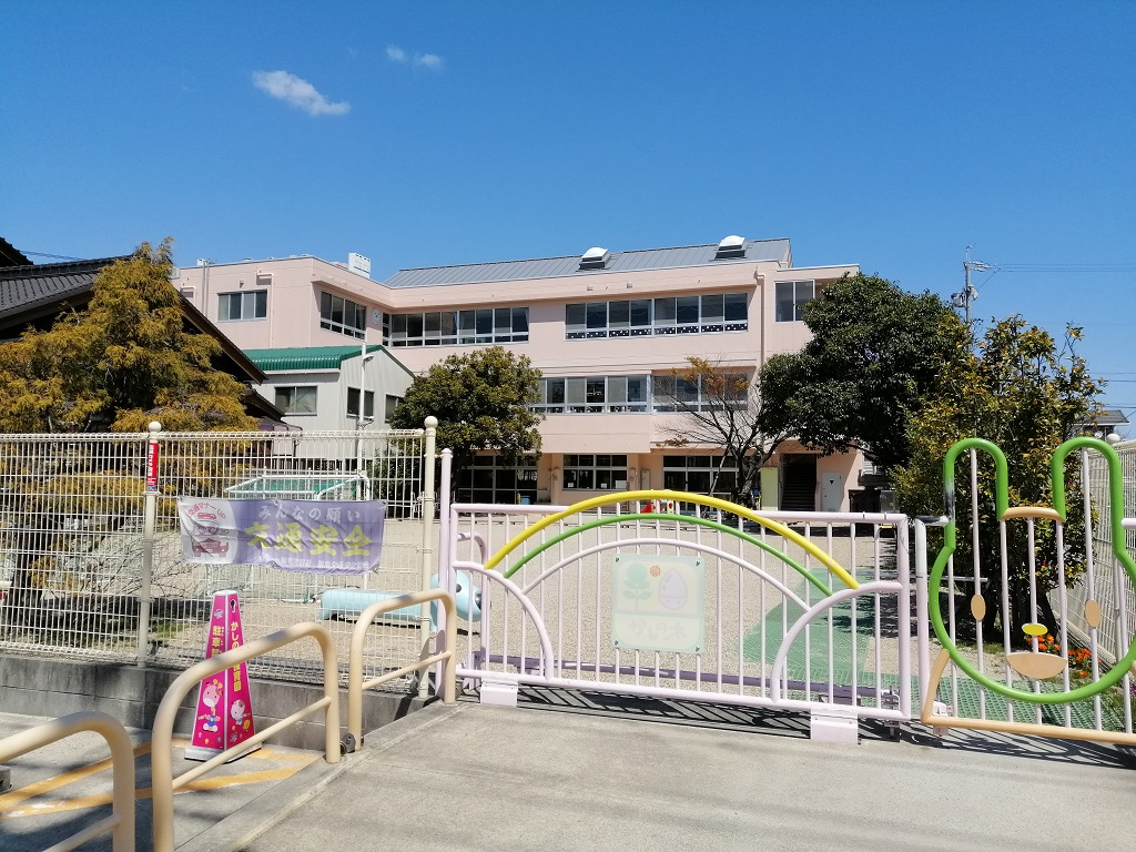 かしの木保育園（碧南市）